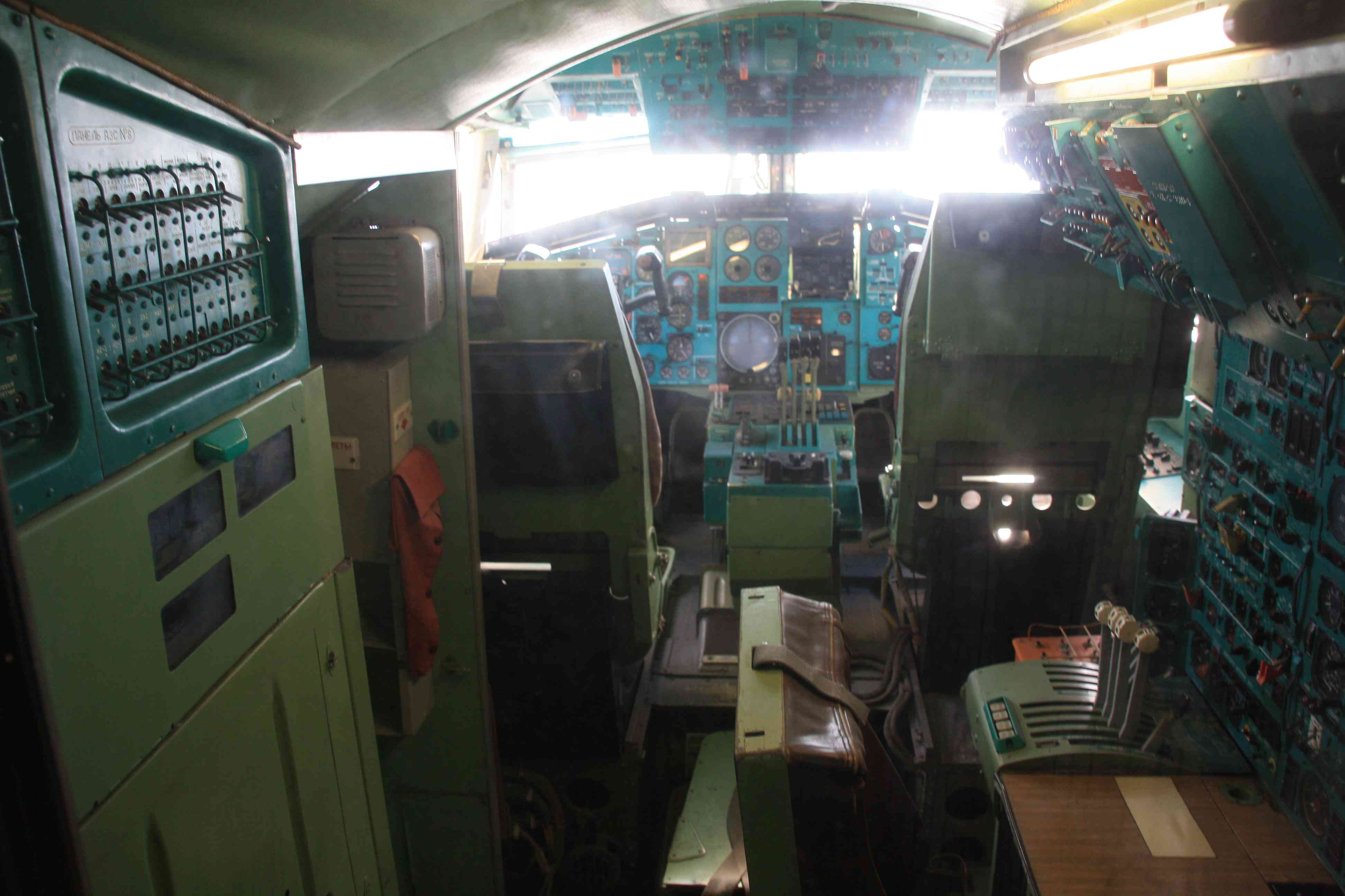 Das Cockpit der Tupolew Tu-144 im Auto- und Technikmuseum Sinsheim